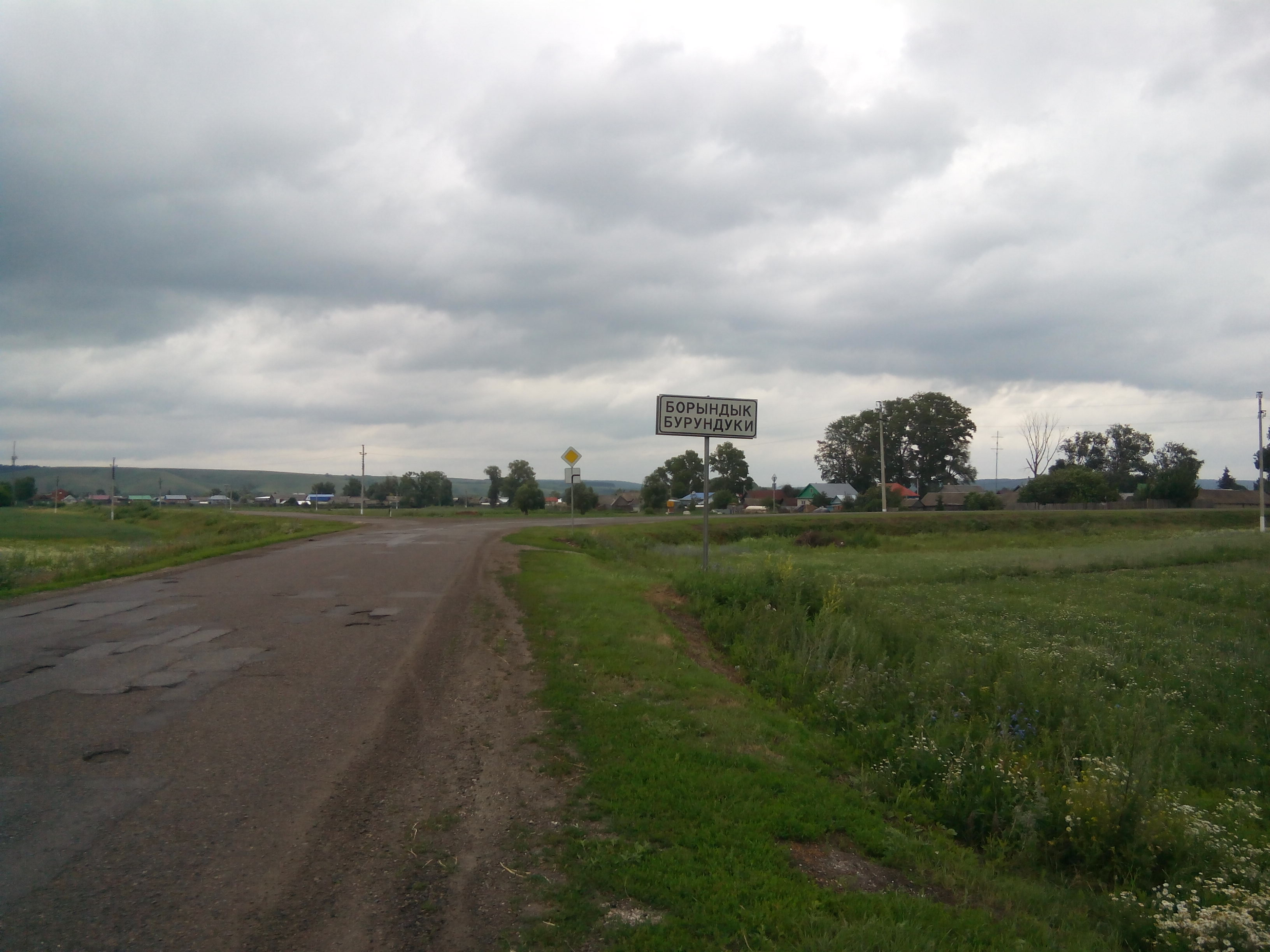 У деревни Бурундуки